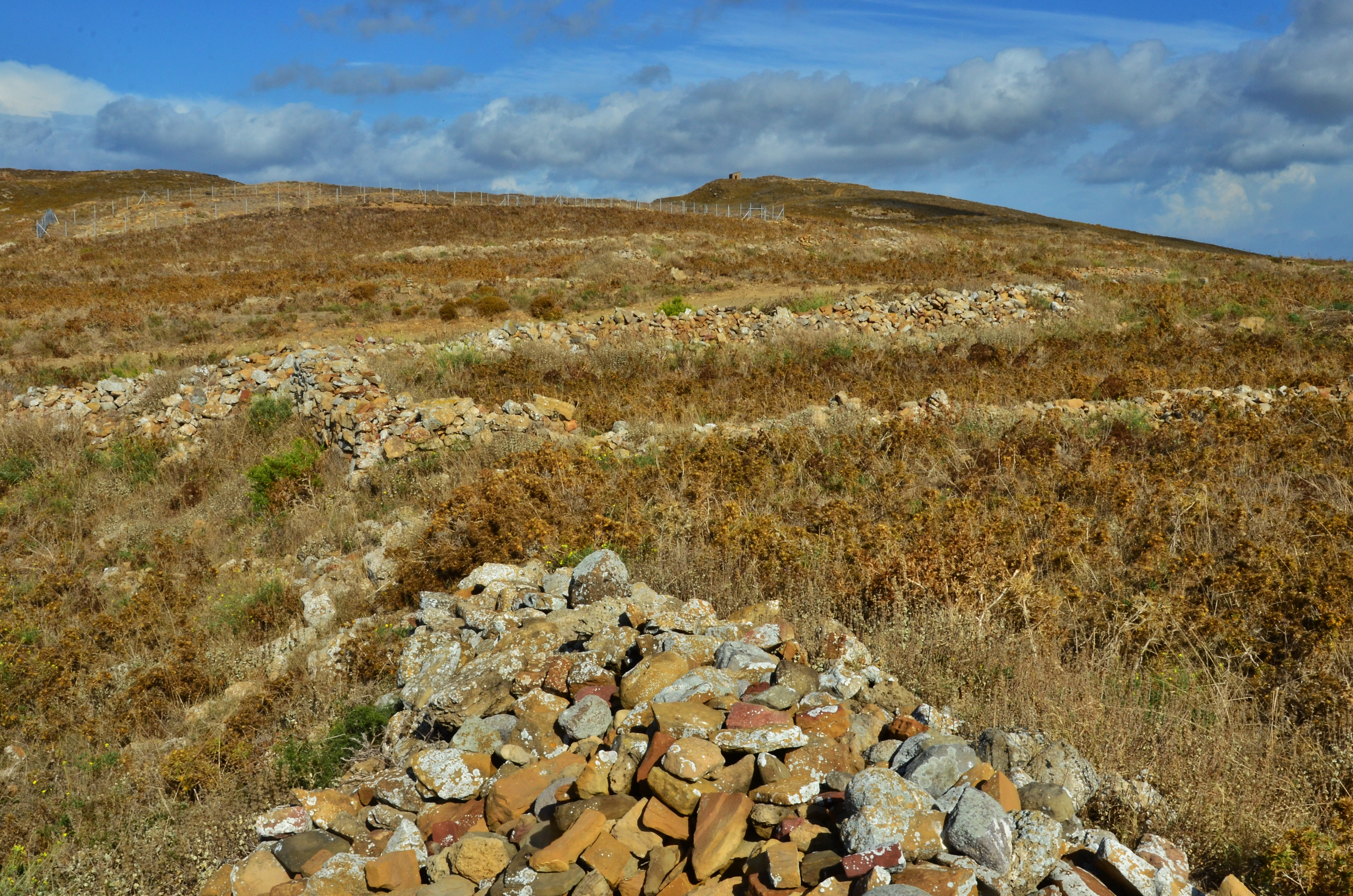 Ερείπια της Αρχαίας Ηφαιστίας Αδειοδότηση Το παραπάνω αρχείο διανέμεται υπό τις δύο παρακάτω άδειες χρήσης. Μπορείτε να επιλέξετε την άδεια της προτίμησής σας.